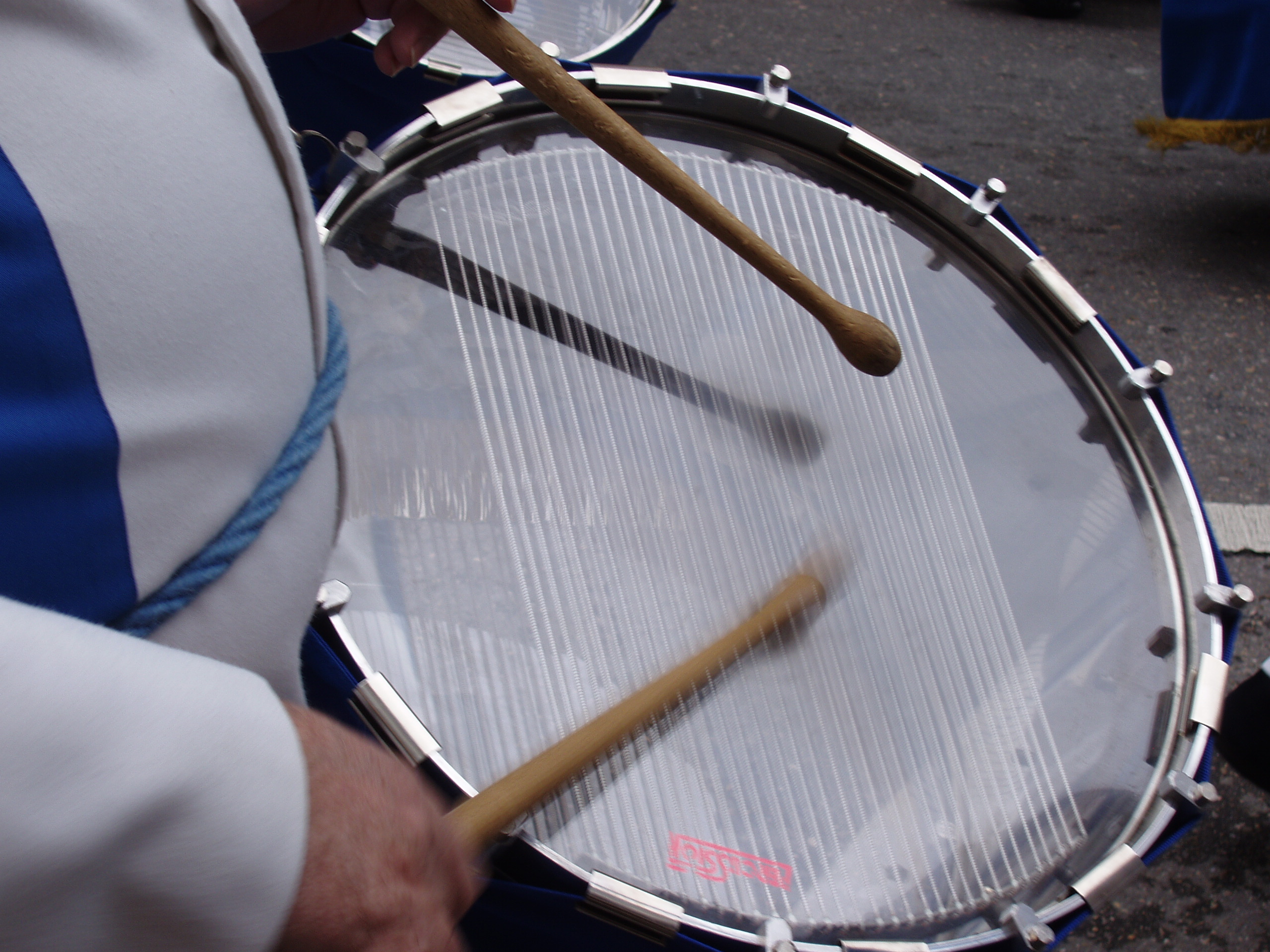 Cofrade tocando el tambor. Domingo de Ramos, Semana Santa, en Zaragoza